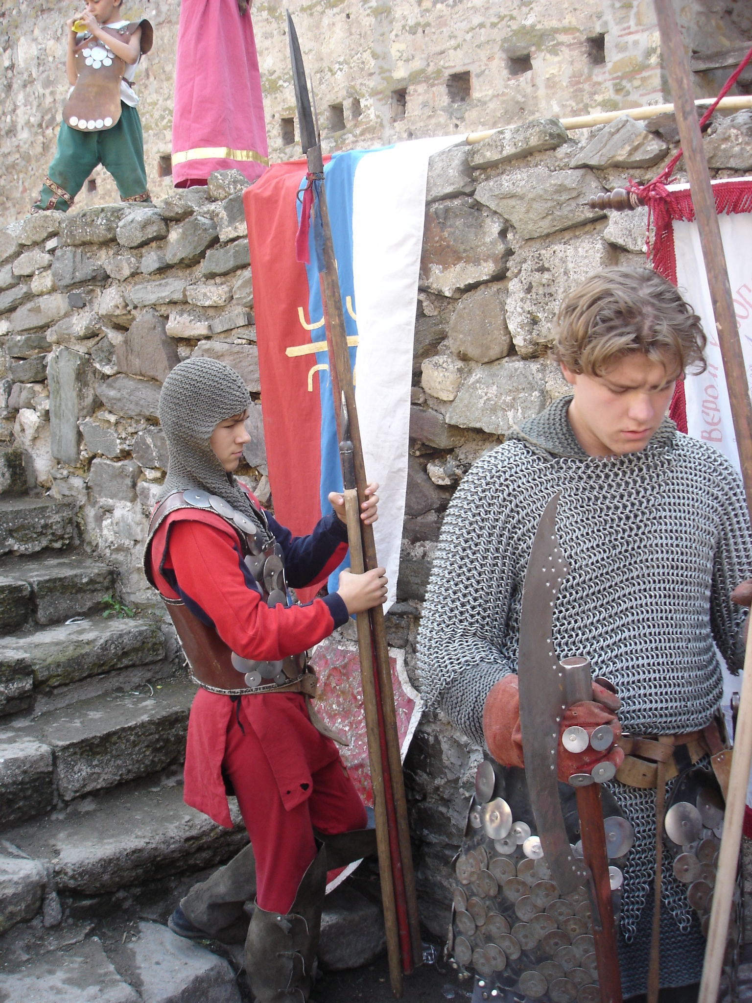 Српски војници